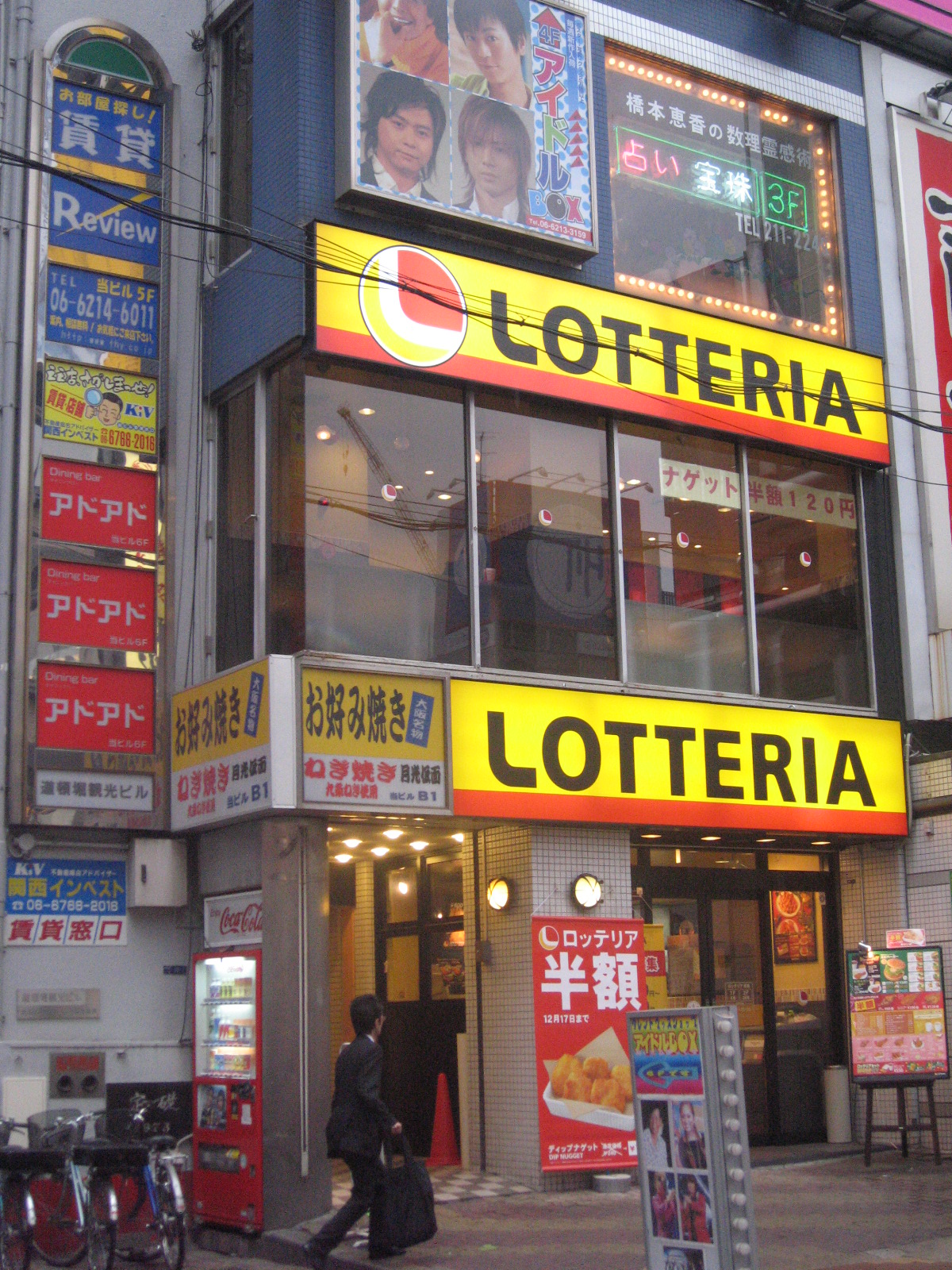 Lotteria restaurant at Dotonbori, Osaka, Kansai Region.